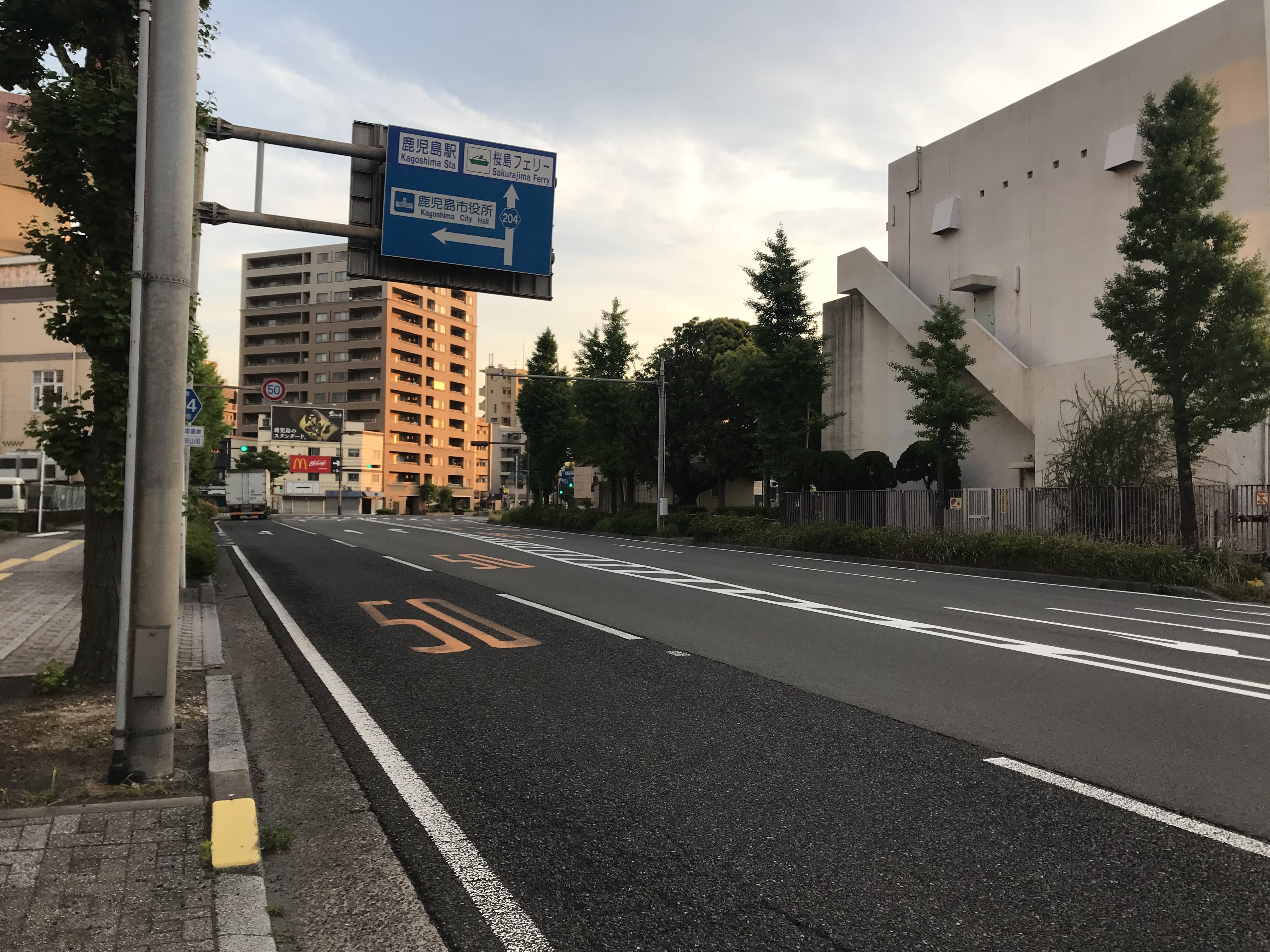 三島村役場付近の鹿児島県道204号